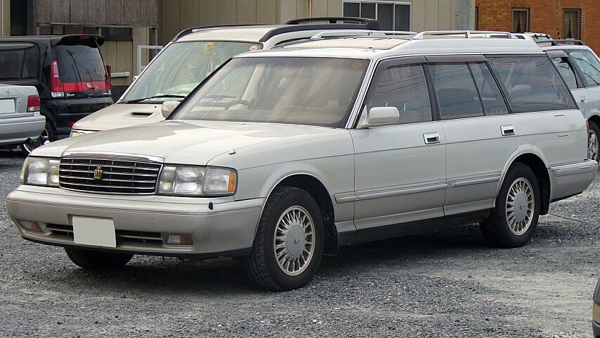 S130系クラウンワゴン